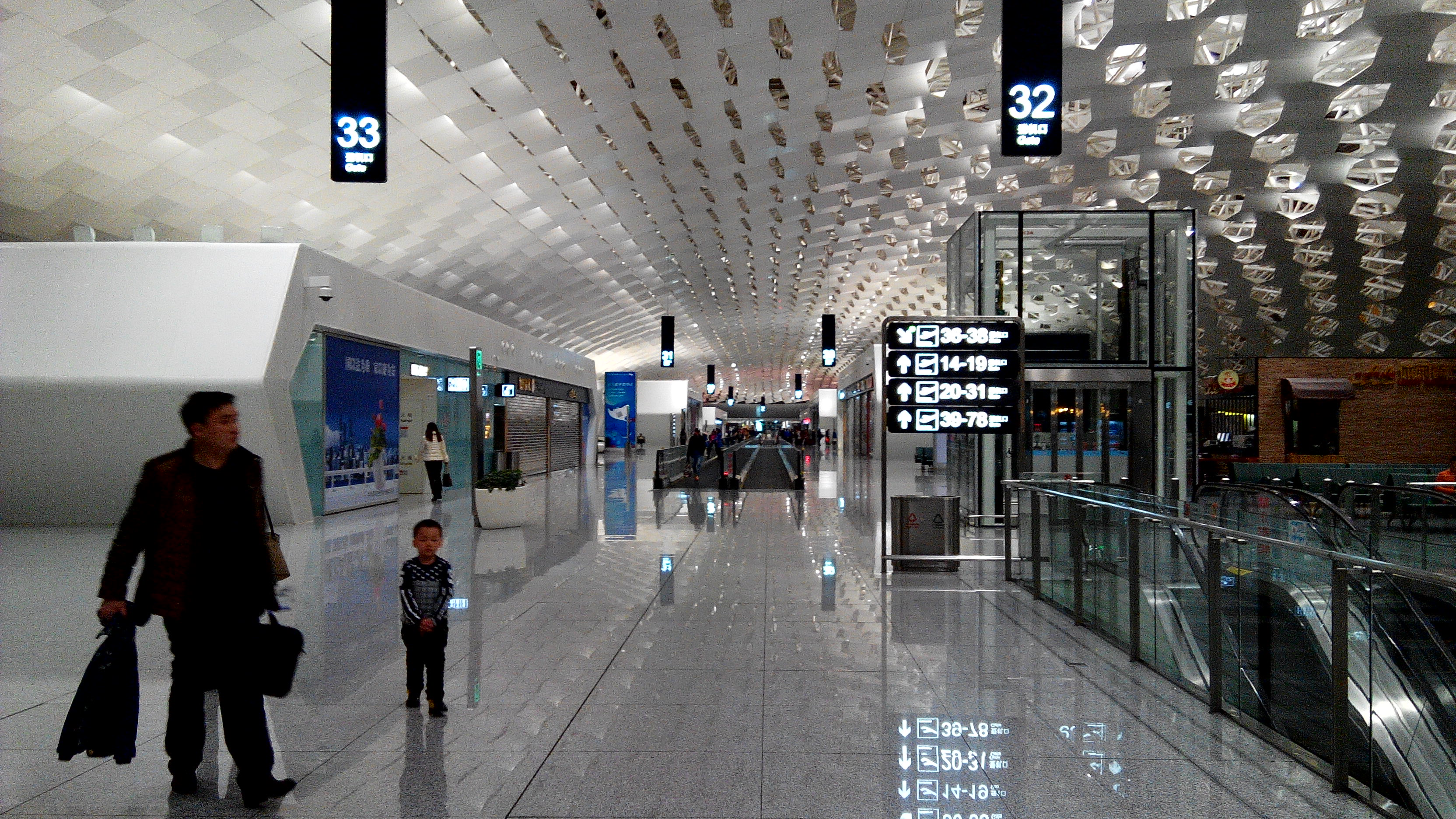 深圳机场 航站楼中心道路